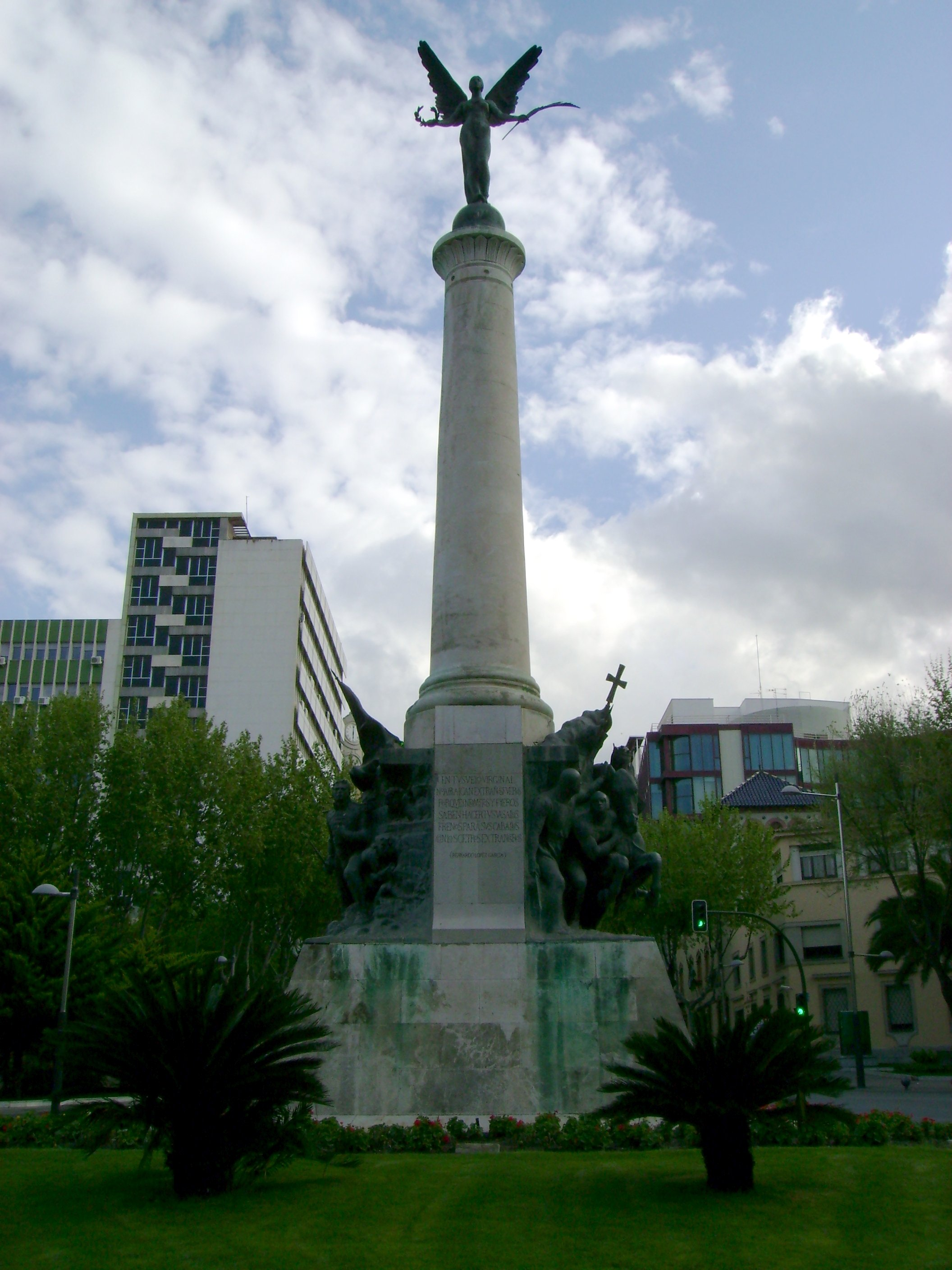 Monumento a Las Batallas en la plaza homónima. Conmemoración de la Batalla de Las Navas de Tolosa y de la Batalla de Bailén. Obra del escultor Jacinto Higueras, 1912.